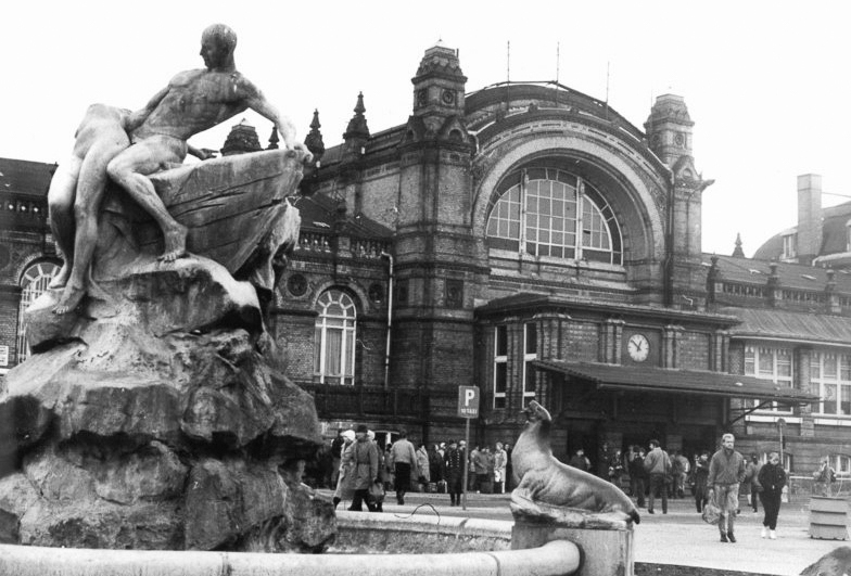 Schwerin, Hauptbahnhof ADN-ZB Pätzold-25.12.1988 Schwerin: Wettbewerb-Rund 3500 Reisende werden täglich im Schweriner Hauptbahnhof, der vor fast 100 Jahren im Repräsentationsstil der Gründerzeit entstand, abgefertigt. Neben hohen Leistungen bei der Bewältigung des Berufs-, Schüler- und Reiseverkehrs wollen die 600 hier tätigen Eisenbahner im kommenden Jahr auch den Titel "Schöner Bahnhof des Bezirkes Schwerin" erringen. -Siehe auch 1988-1225-7N und 8N.